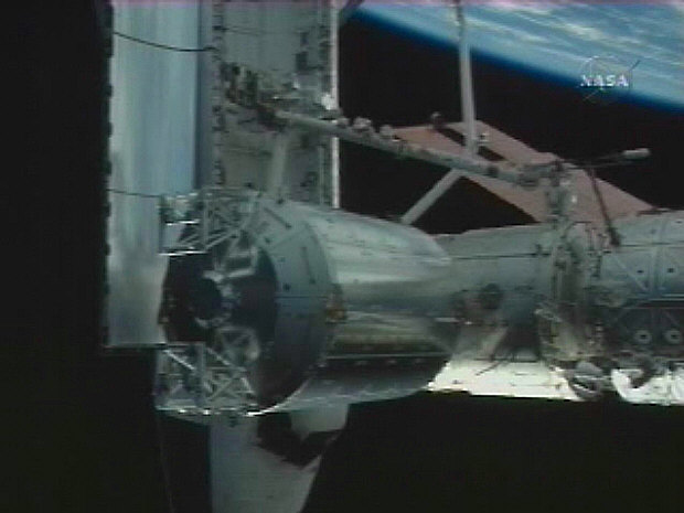 Columbus module